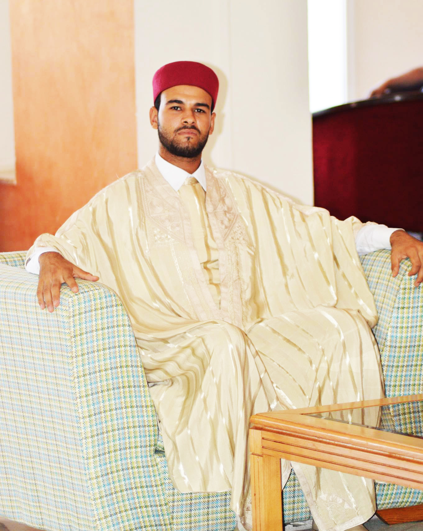 الجبة التونسية من أهم رموز اللباس التونسي العتيق This is an image of Cultural Fashion or Adornment from Tunisia